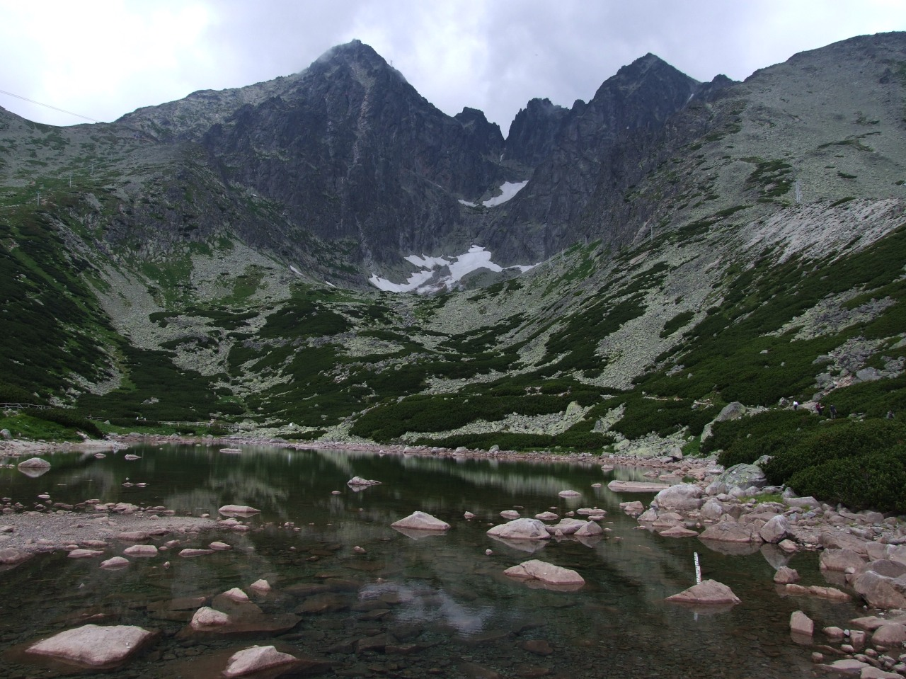 Łomnicki Staw i widok na Łomnicę i Widły